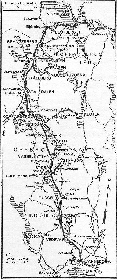 Linjen Ludvika - Vanneboda (Frövi)